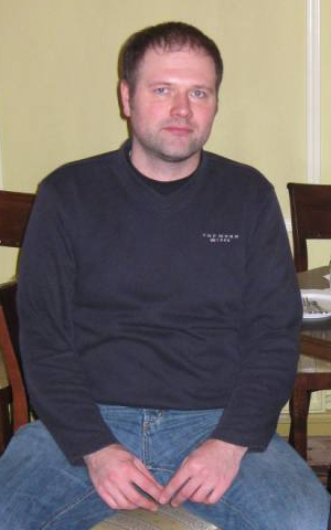 Meelis Süld 2011. aasta jaanuaris